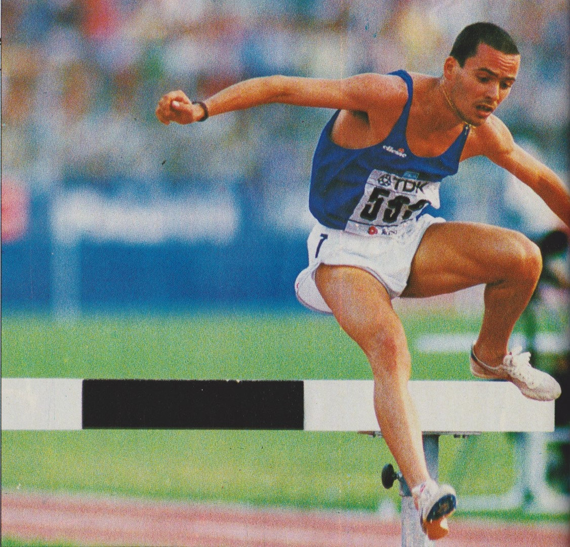 Francesco Panetta impegnato nei 3000 metri siepi ai Mondiali del 1987 a Roma. Vincerà la medaglia d'oro.